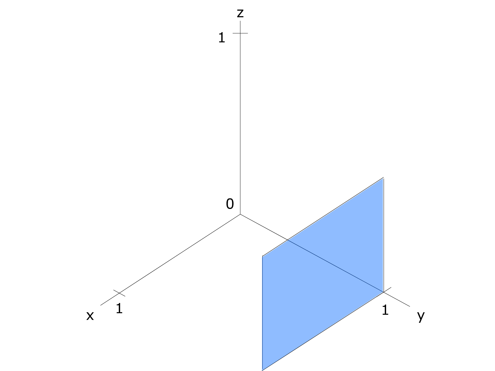 KristallEbenen - Miller Index